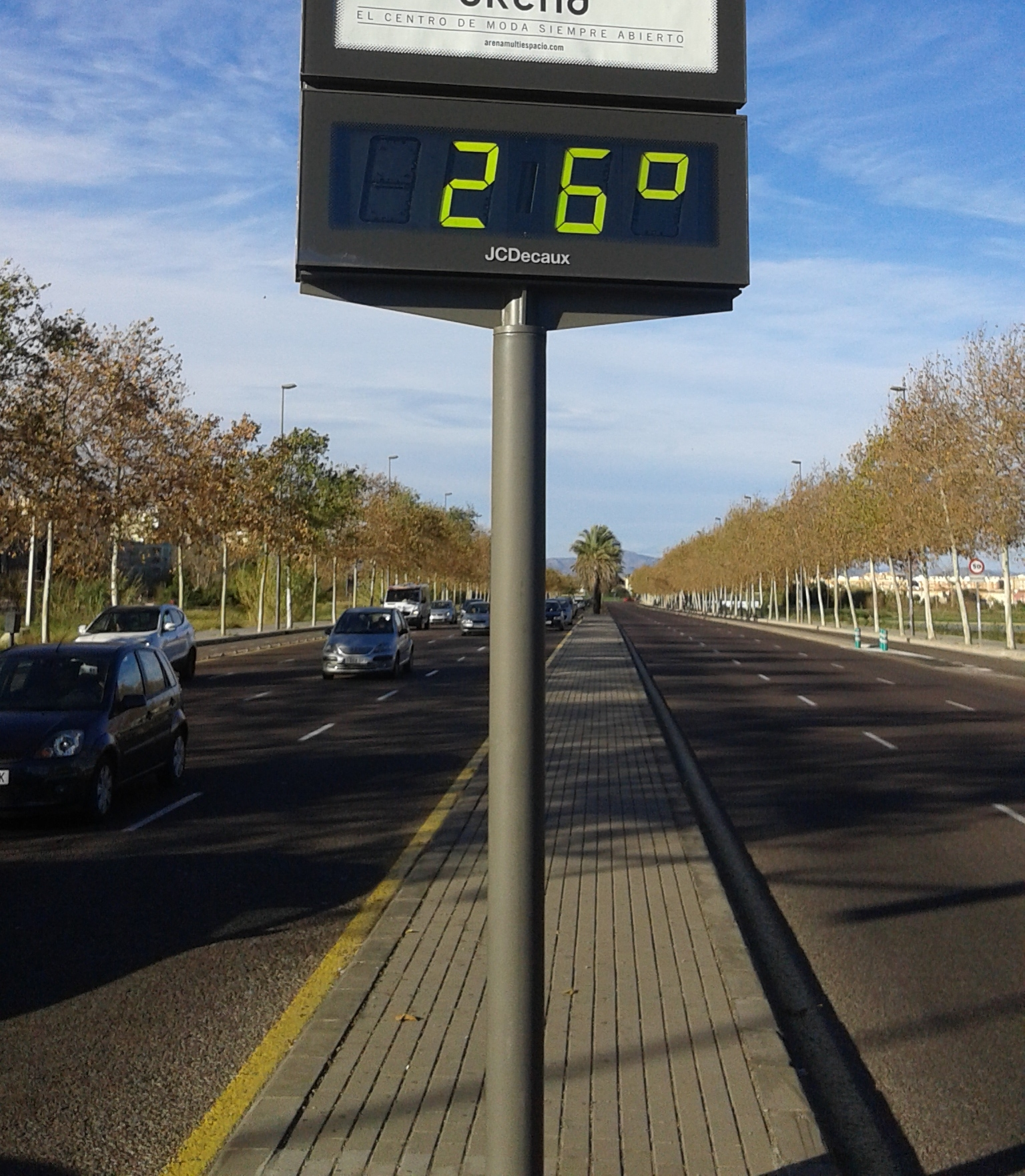 Inusuals 26º C a la ciutat de València el 8 de gener de 2016